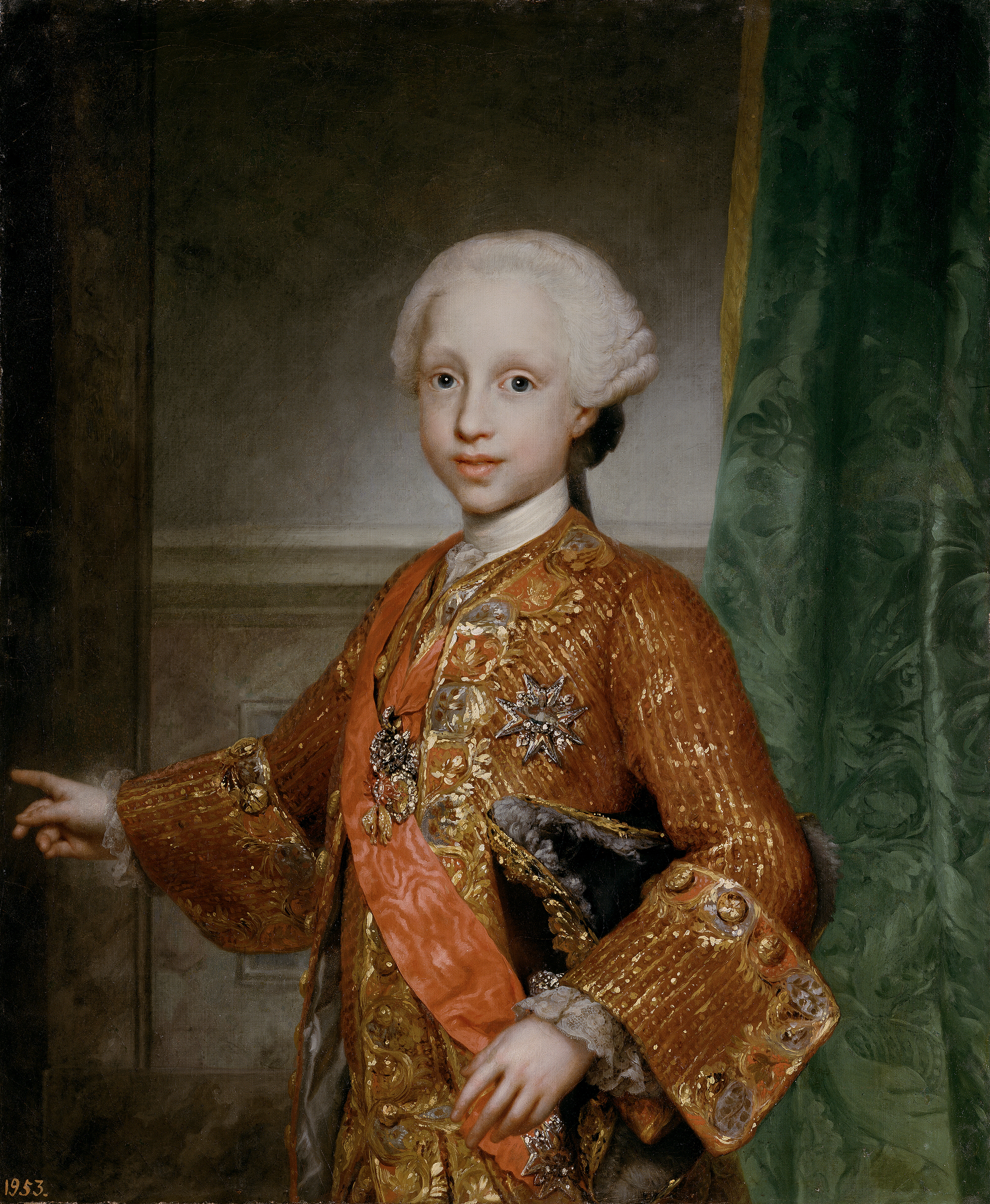 Retrato del infante Francisco Javier de Borbón (1757-1771), que fue el menor de los hijos del rey Carlos III de España y de la reina María Amalia de Sajonia.